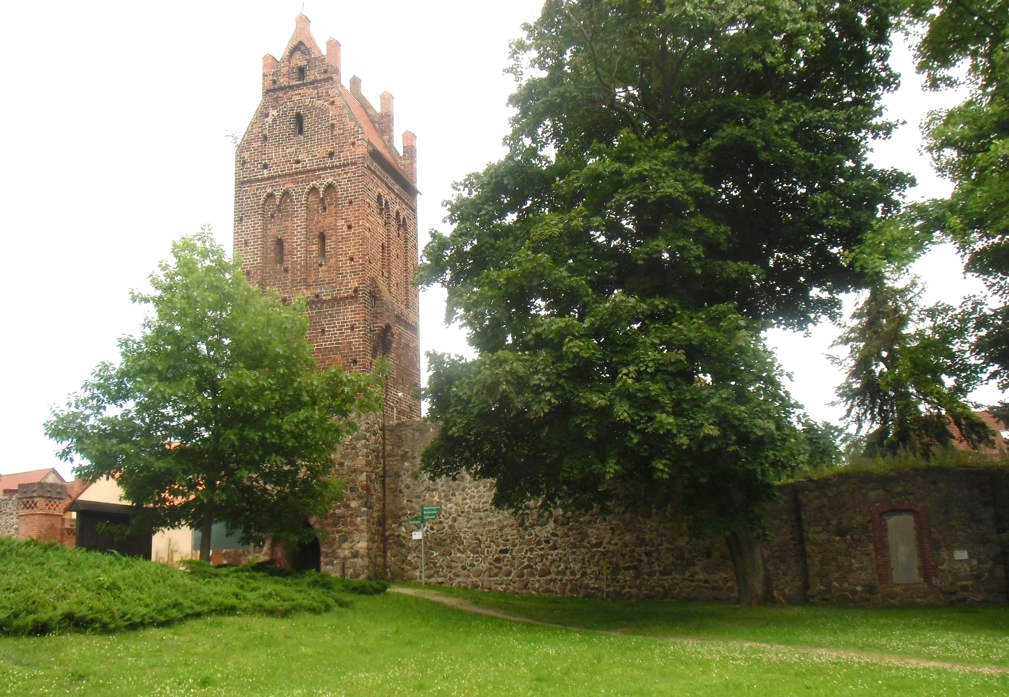 Stadtmauer von Müncheberg ab 1319 errichtet. Der Berliner Torturm als Verteidigungsturm des Berliner Tores diente als Pulverlager und Gefängnis, eingetragen in die Liste der Baudenkmale in Müncheberg